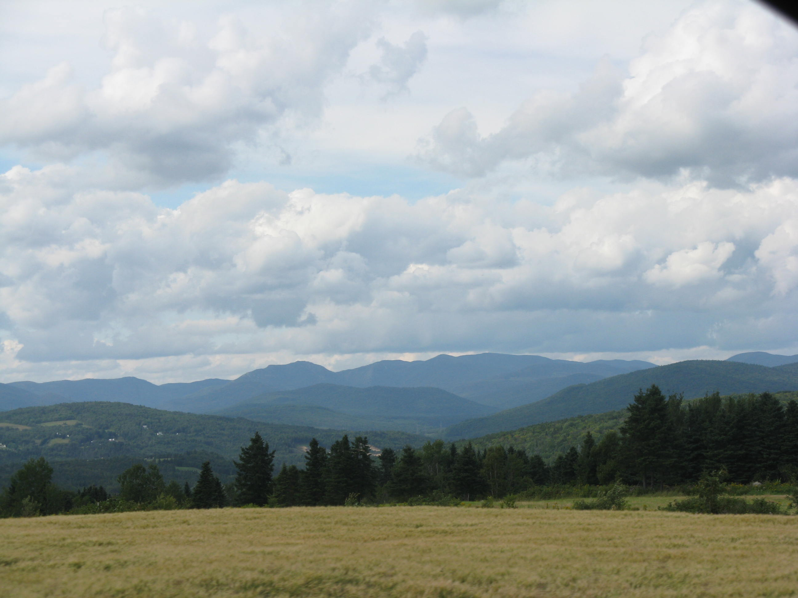 Mont Raoul-Blanchard vue depuis la route 138 à St-Tite-des-Caps